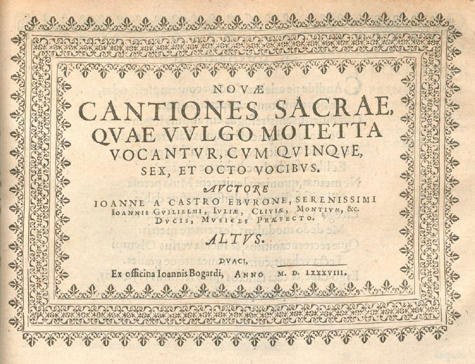 Title page of Jean de Castro Novae Cantionae sacrae, 1588